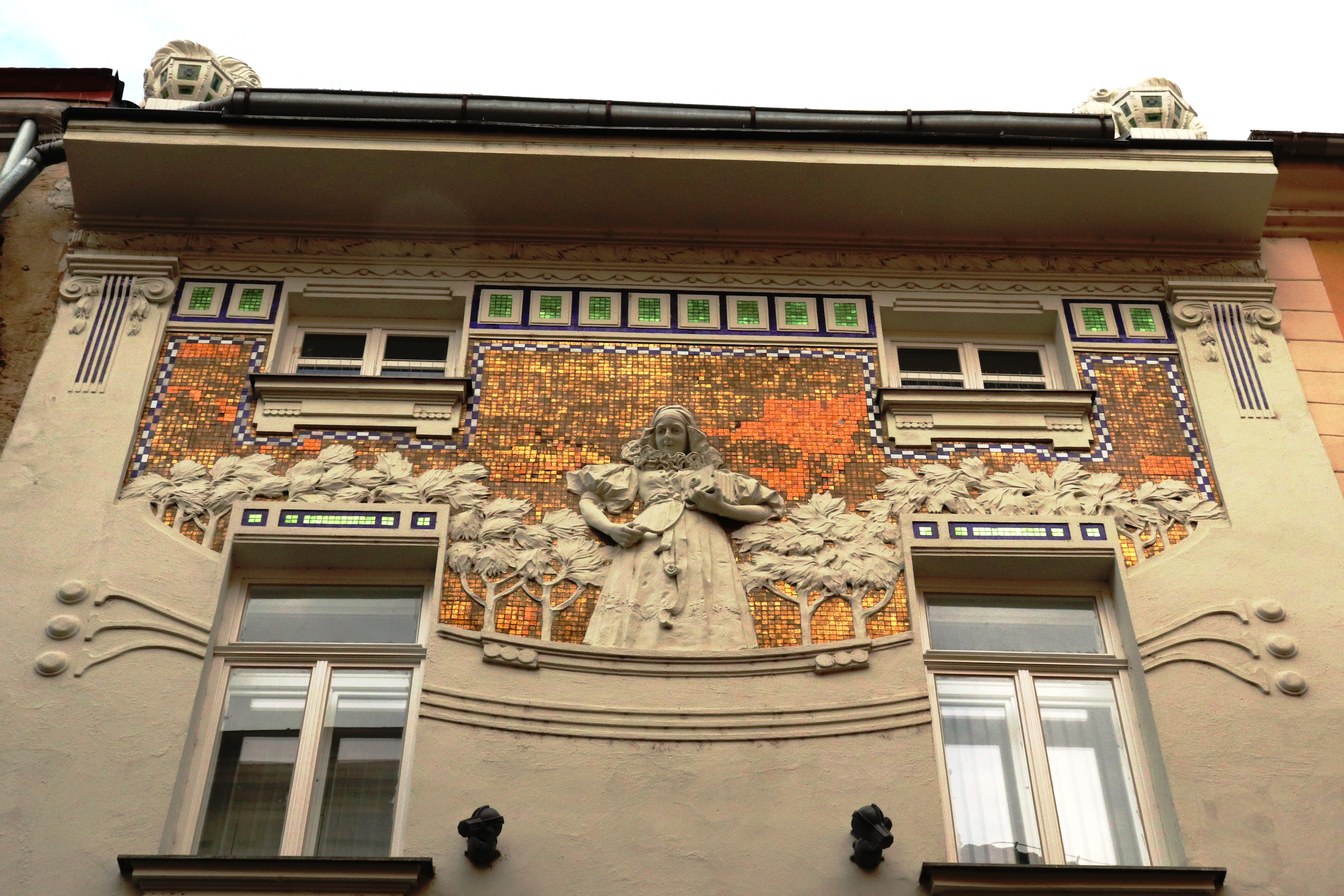 Hanačka s fotoaparátem - mozaika, Ostružnická 351/25, Olomouc-město.